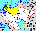 佐賀県東松浦郡の位置（緑：玄海町）